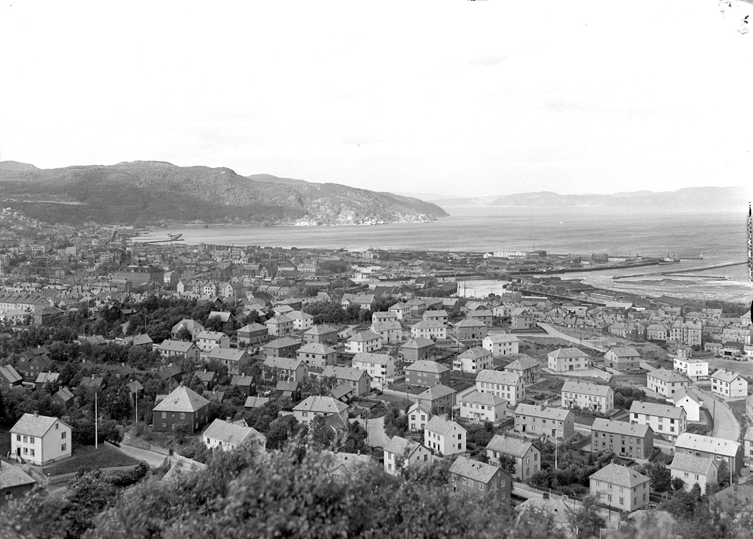 Utsikt over Trondheim i 1939.